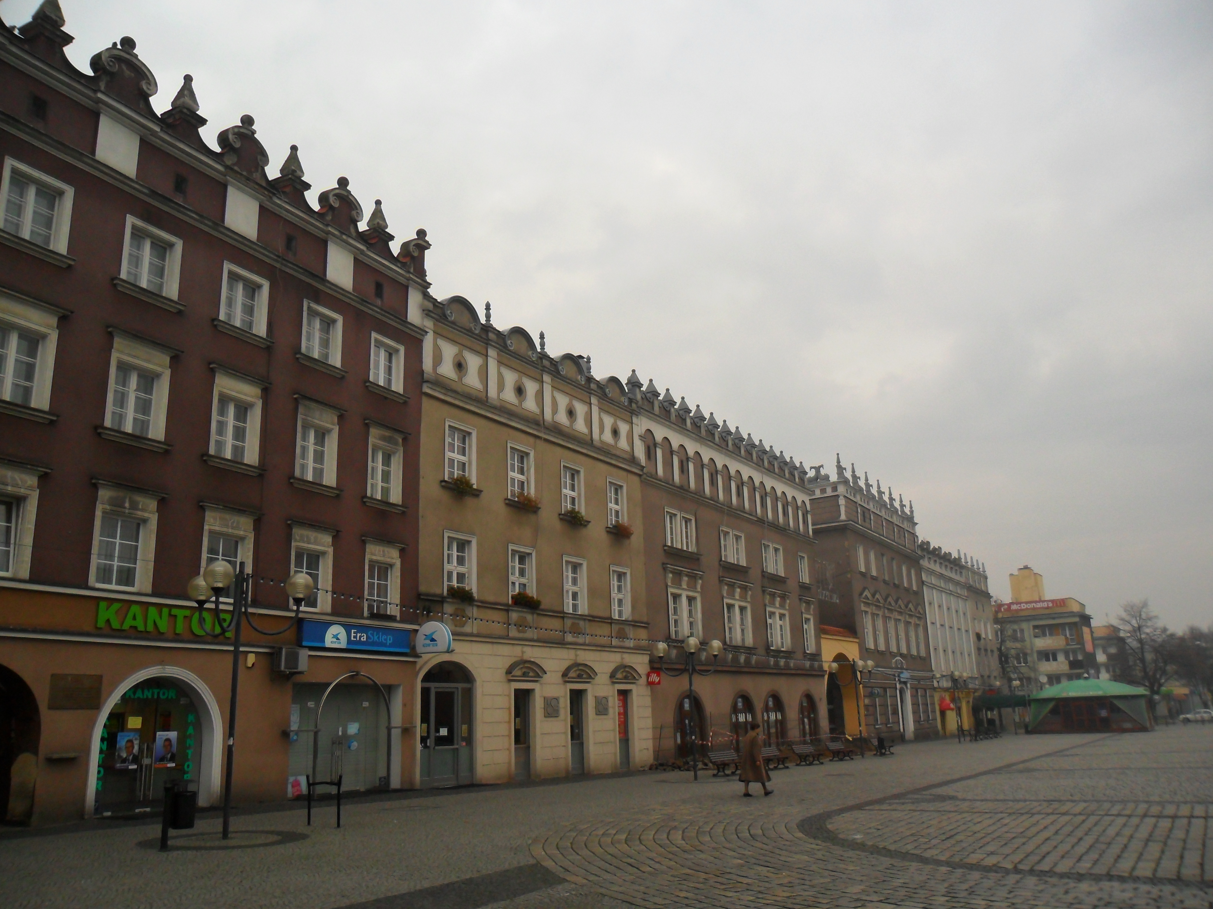 Kamienice na rynku w Raciborzu